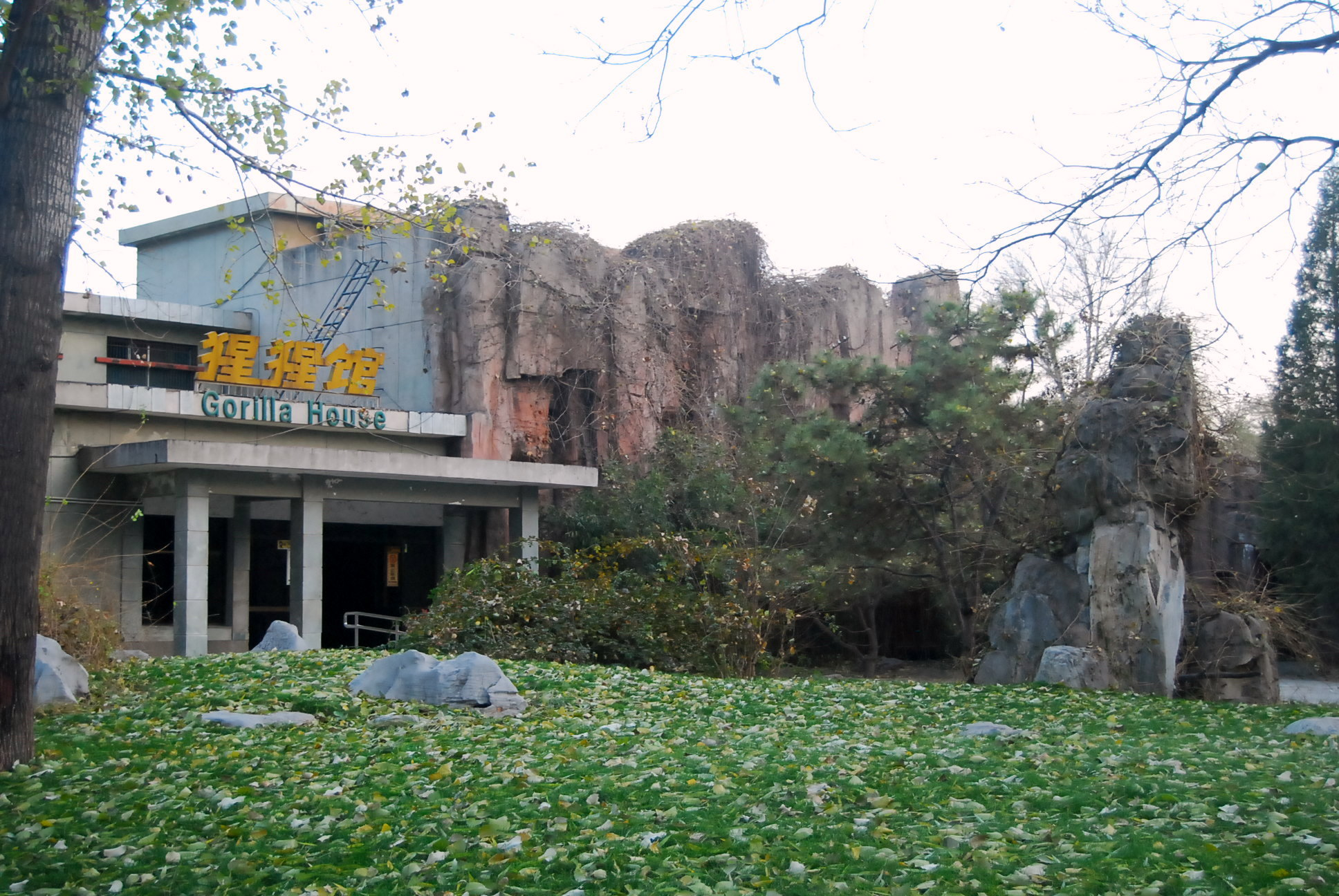 北京动物园的猩猩馆